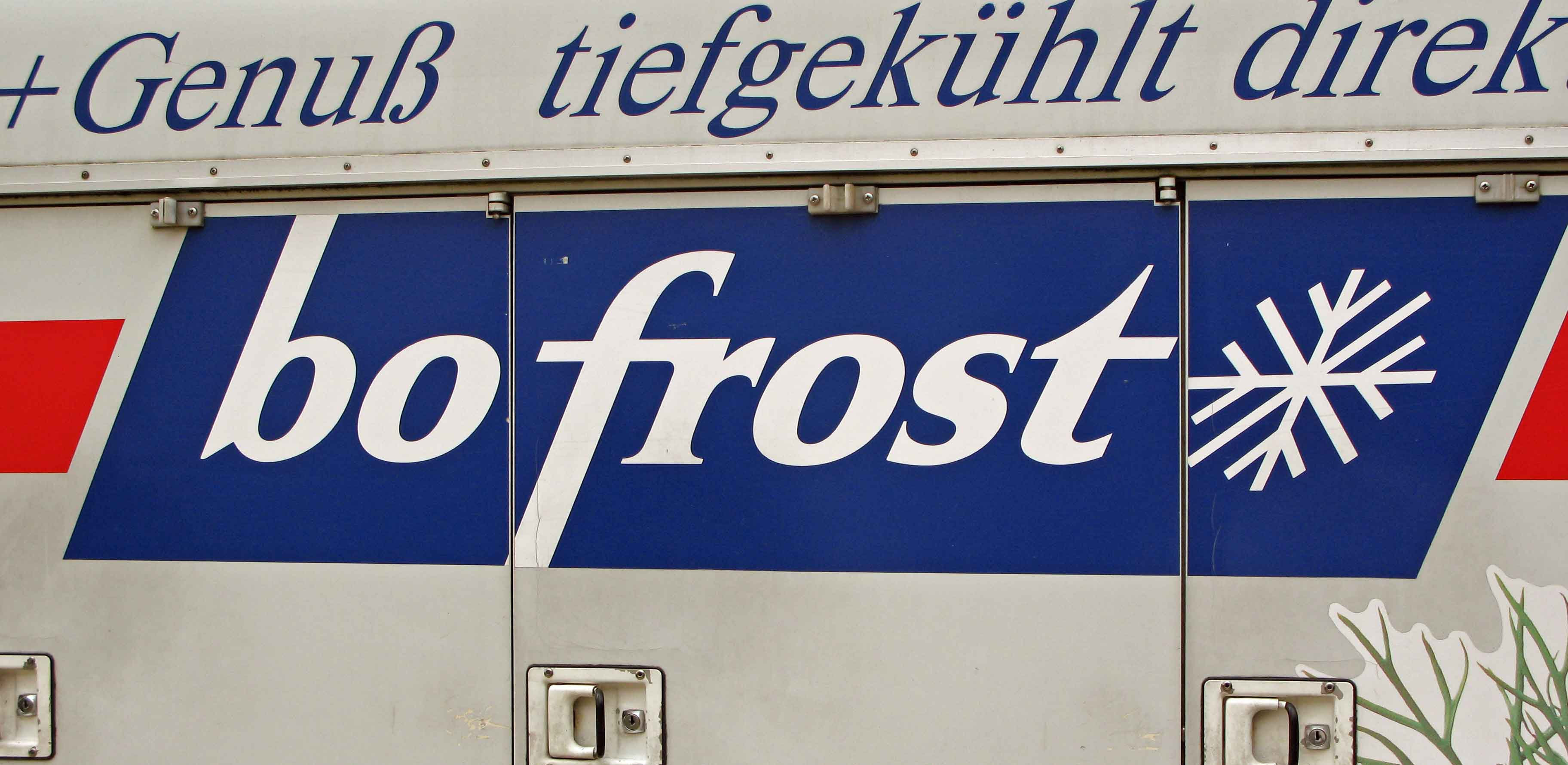 Bofrost.